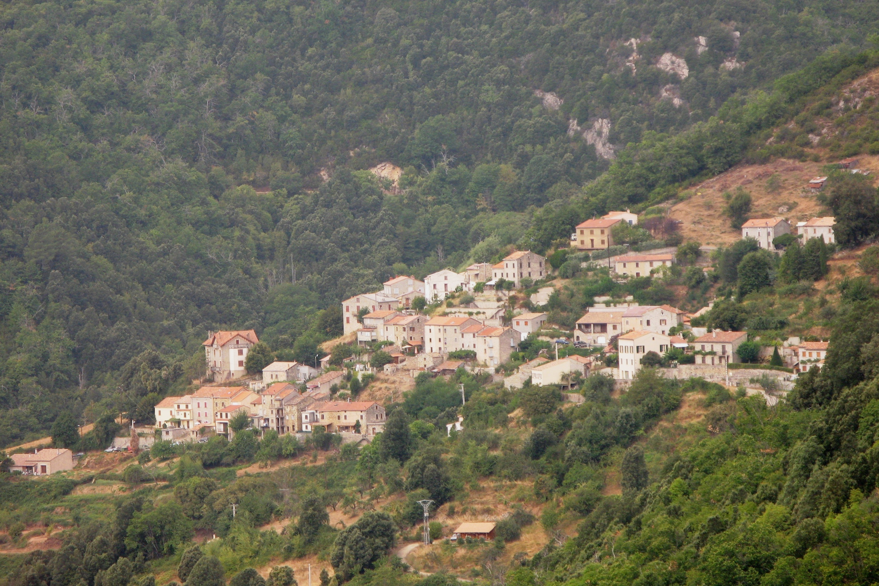 Vue op Tolla vun Nordosten. Kategorie:Uertschaften am Departement Corse-du-Sud